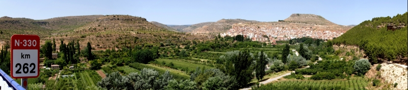 Panorámica de Ademuz desde el puente de la carretera N-330